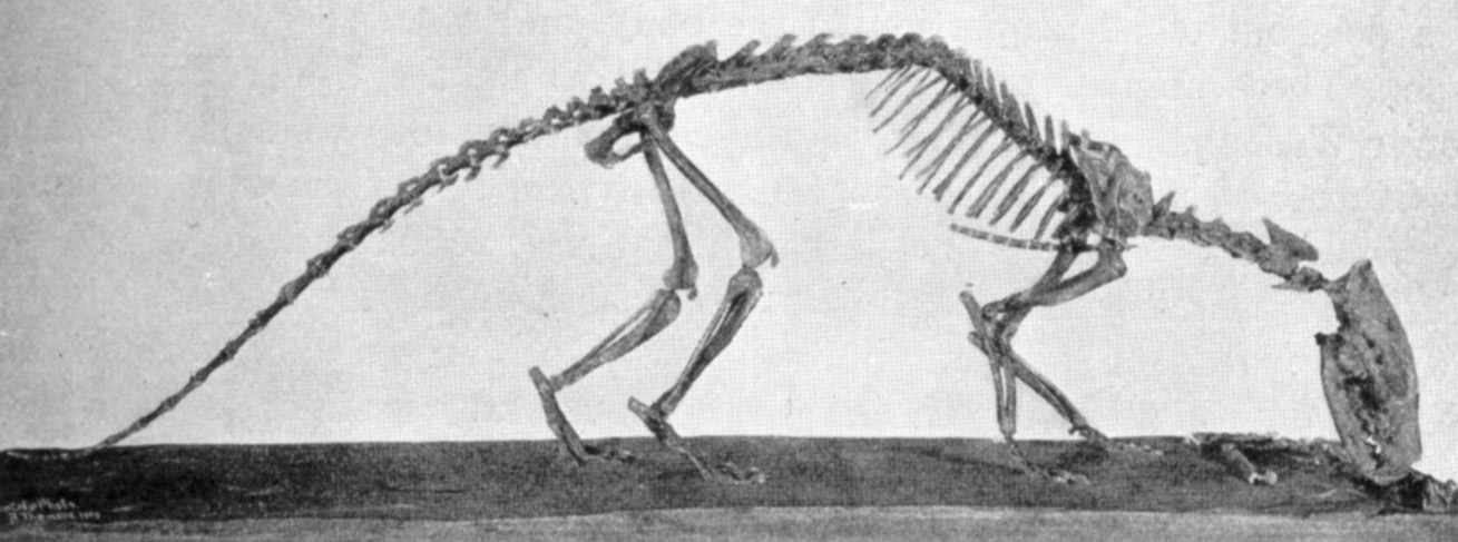 Tritemnodon agilis skeleton, AMNH.